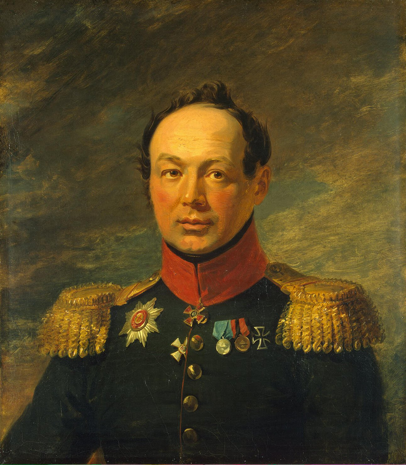 Ivan Alexandrovich Nabokov (11.03.1787 – 21.04.1852) russian general